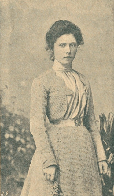 Retrato de estudio de Mariya Spiridónova, anterior a enero de 1906, según .